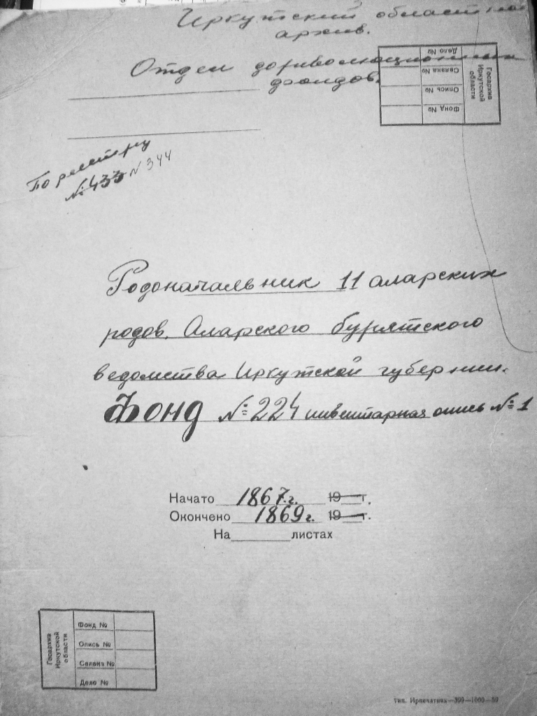 Родоначальник 11 аларских родов. Аларского бурятского ведомства Иркутской губернии. Фонд 224 инвентарная опись №1 1867-1869гг.